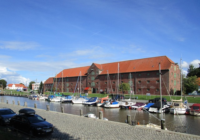 Pakhuset i Tønning